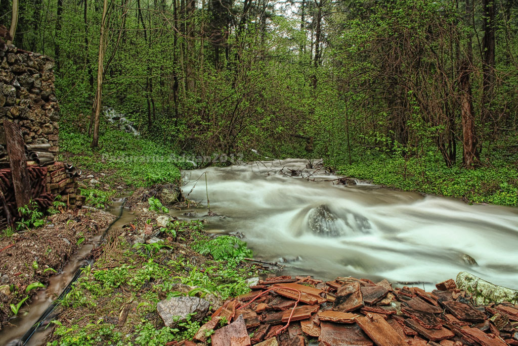 Susara river